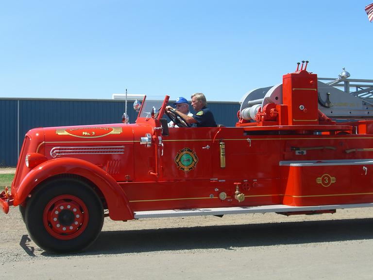 Antique fire engine, taken at Antique Powerland.